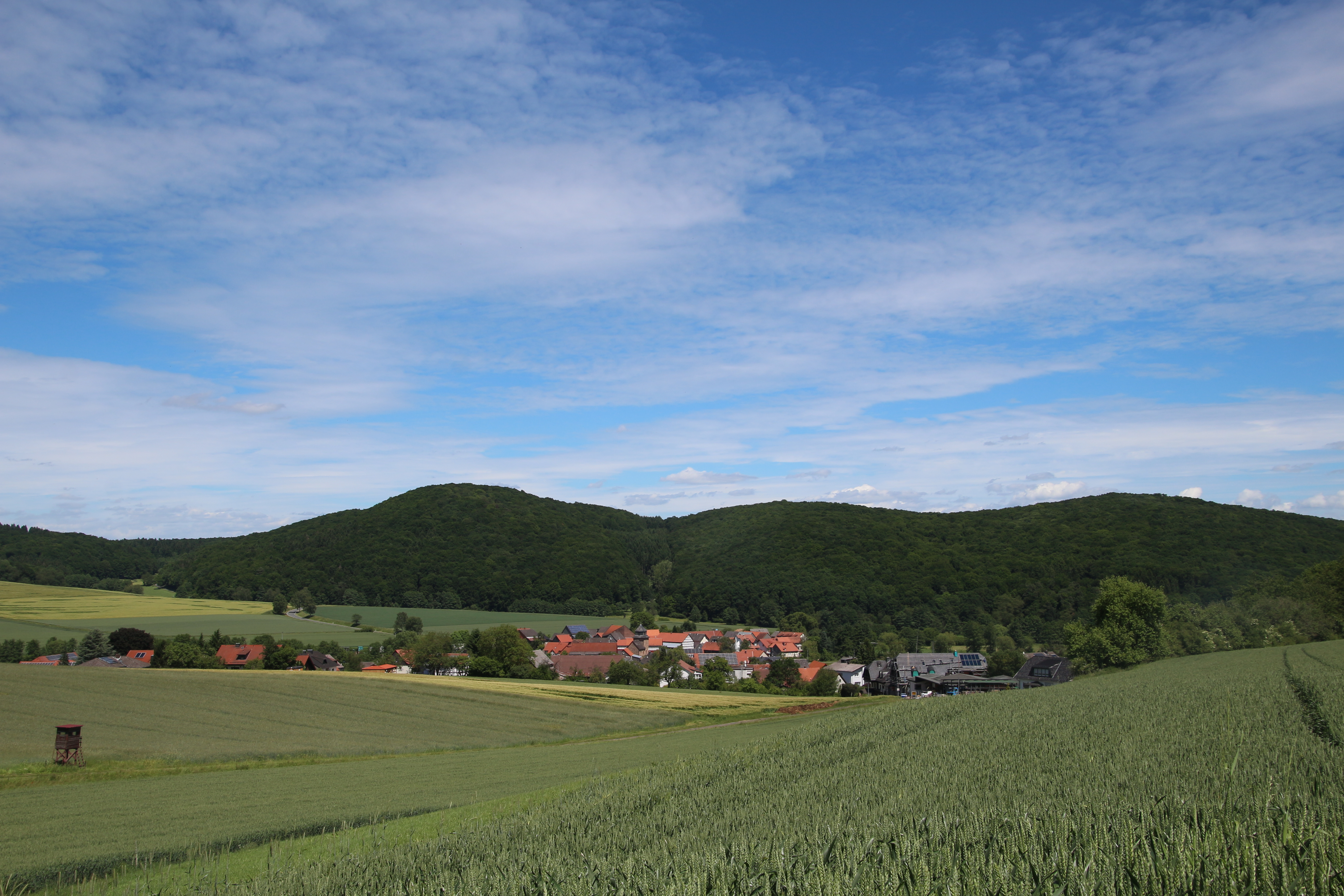 Siehe Bild und Dateiname